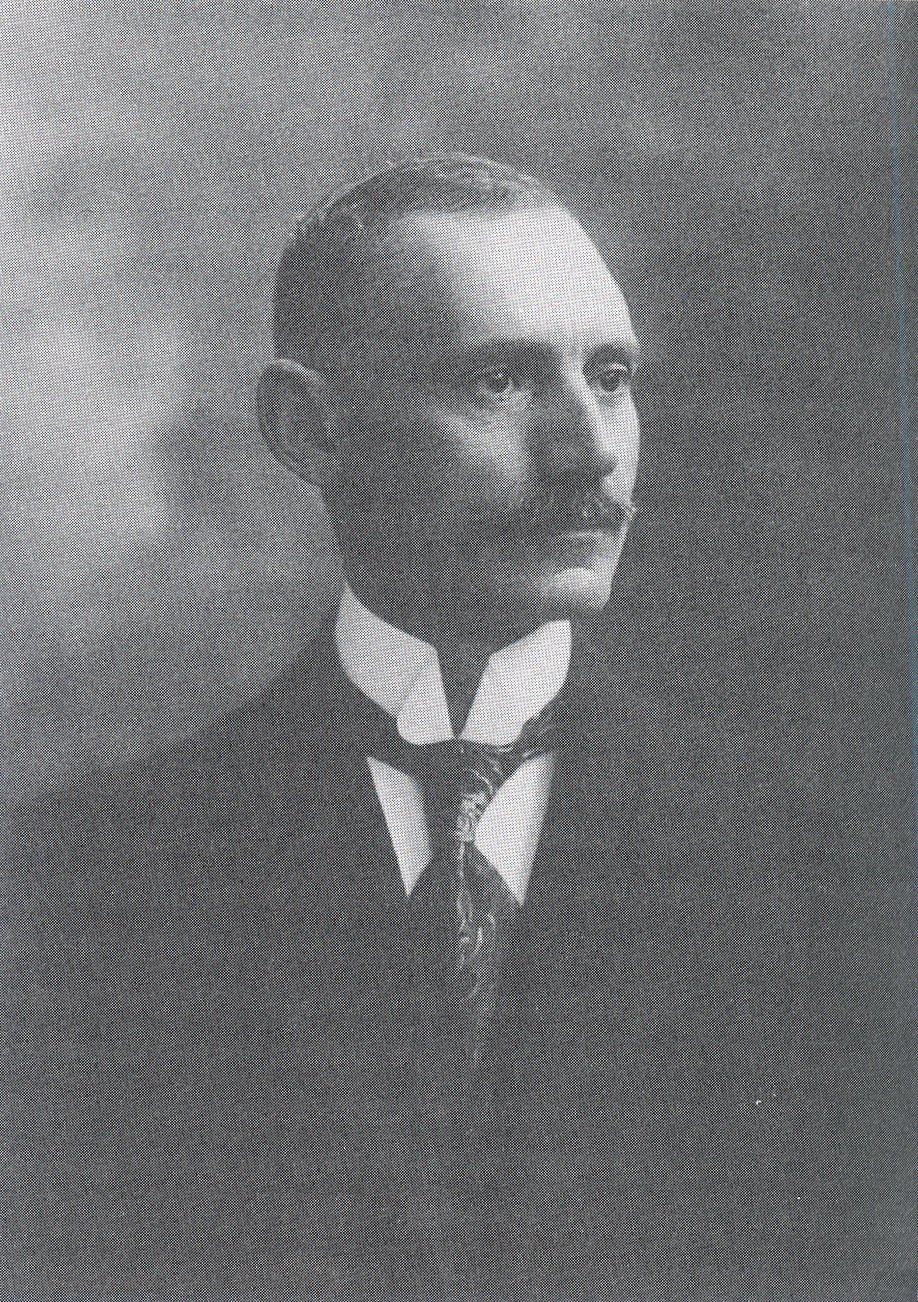 Никола Стоянов по време на Конференцията в Генуа